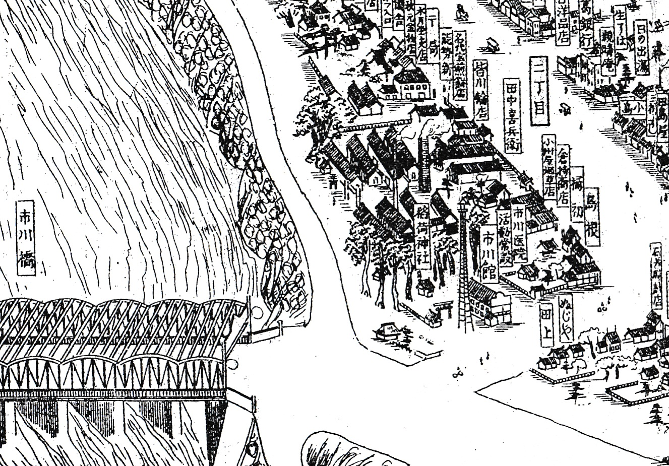 千葉県東葛飾郡市川町の市川橋（現在の同県市川市の市川橋）と市川館（現存せず）付近の略図、1928年